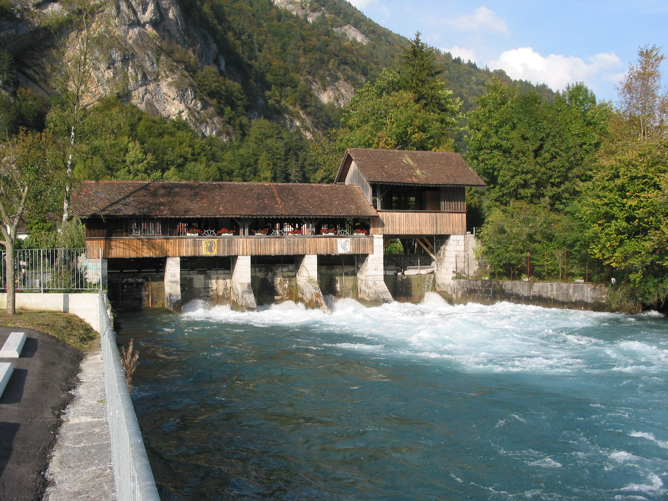 Wasserwehr in Interlaken (Schweiz)